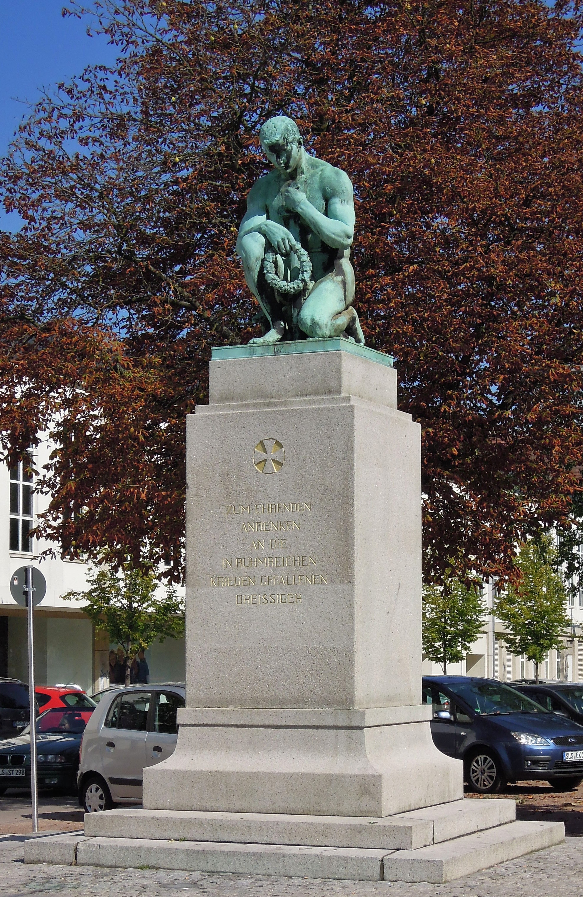 Hohenzollern-Ring, sog. „Dreißiger Denkmal“, Ehrenmal, 1910 von Lauchhammer (Einzeldenkmal)